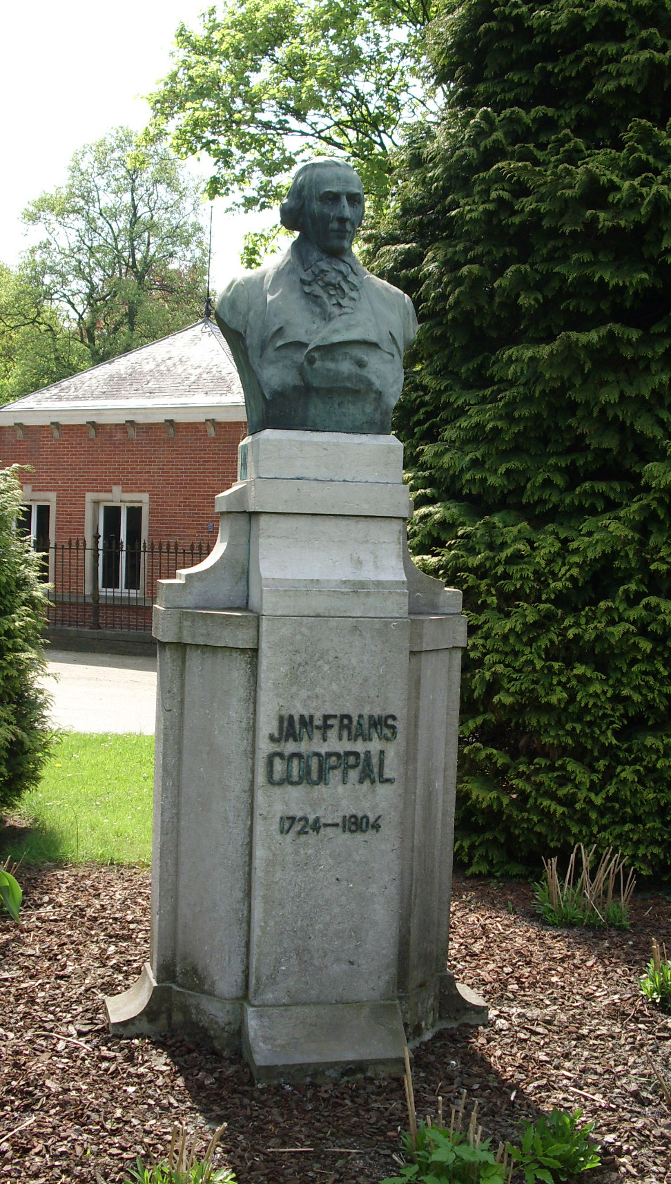 Borstbeeld van Jan Frans Cooppal - industriezone Stookte - Overschelde - Wetteren - Oost-Vlaanderen - Vlaanderen - België. Was in 1778 stichter van de poederfabriek aldaar.